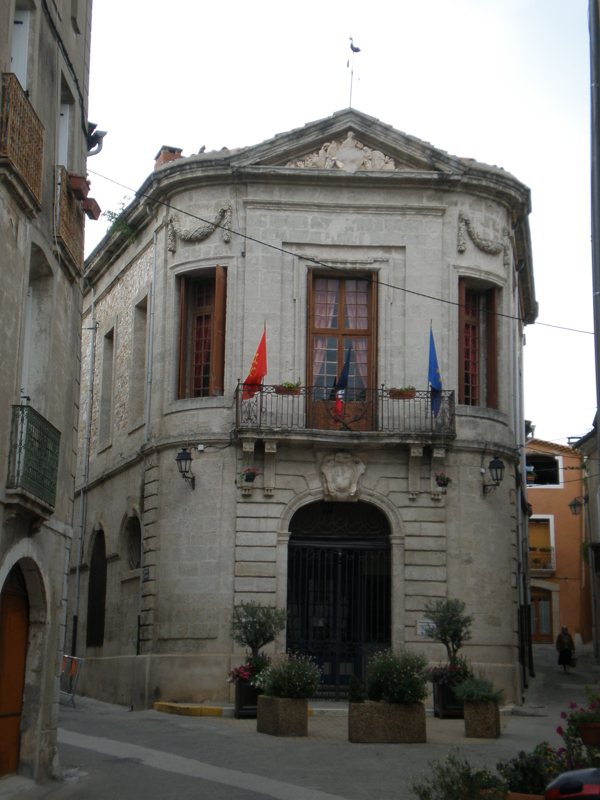 Ajuntament d'Anhana